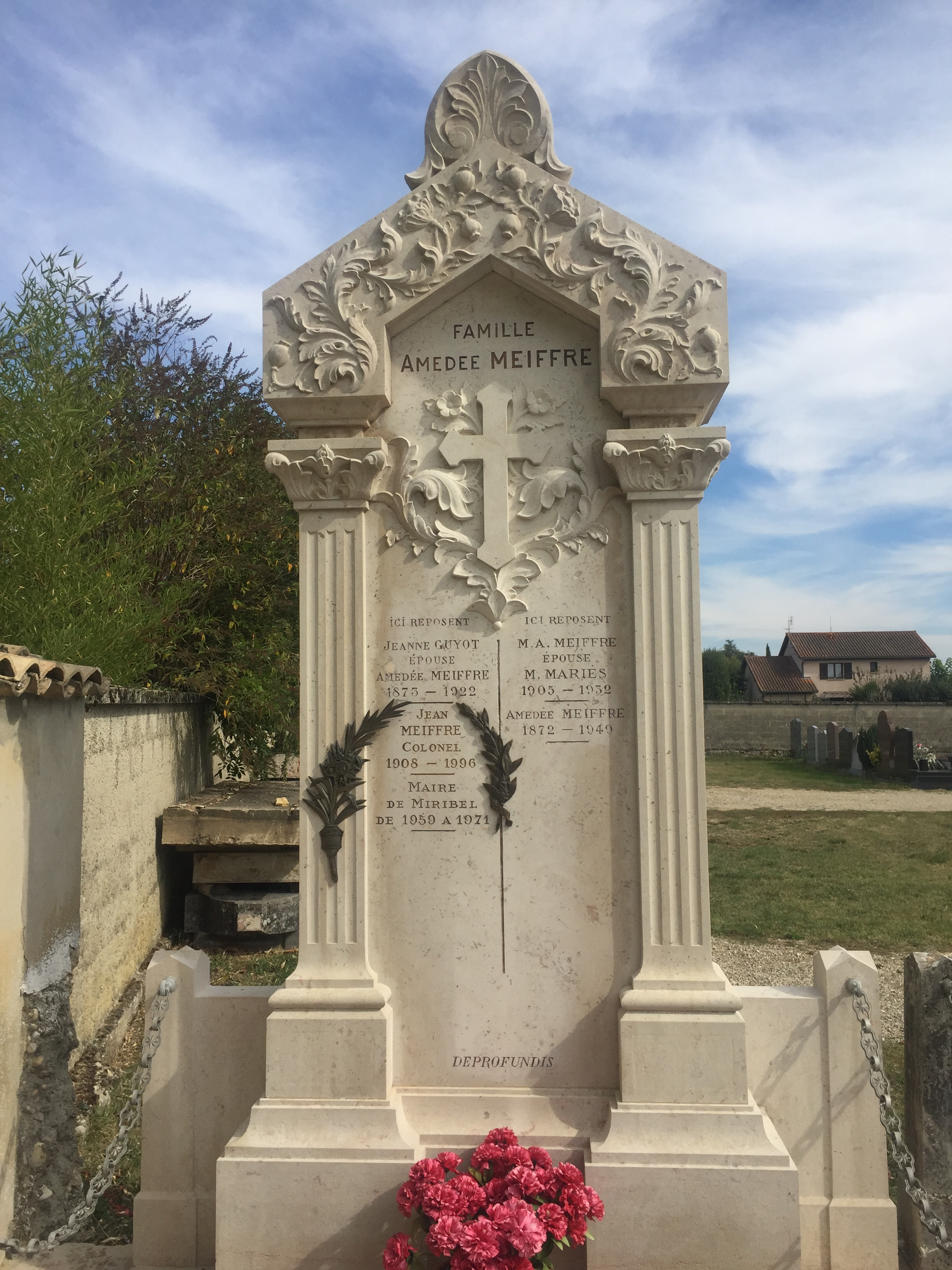 Cimetière Saint-Martin, Miribel, octobre 2016.